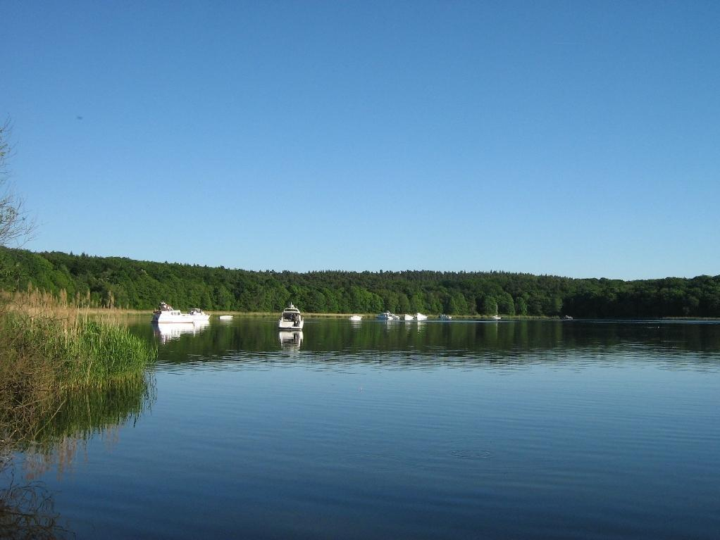 der Lehnitzsee bei (Potsdam, Brandenburg, Germany).